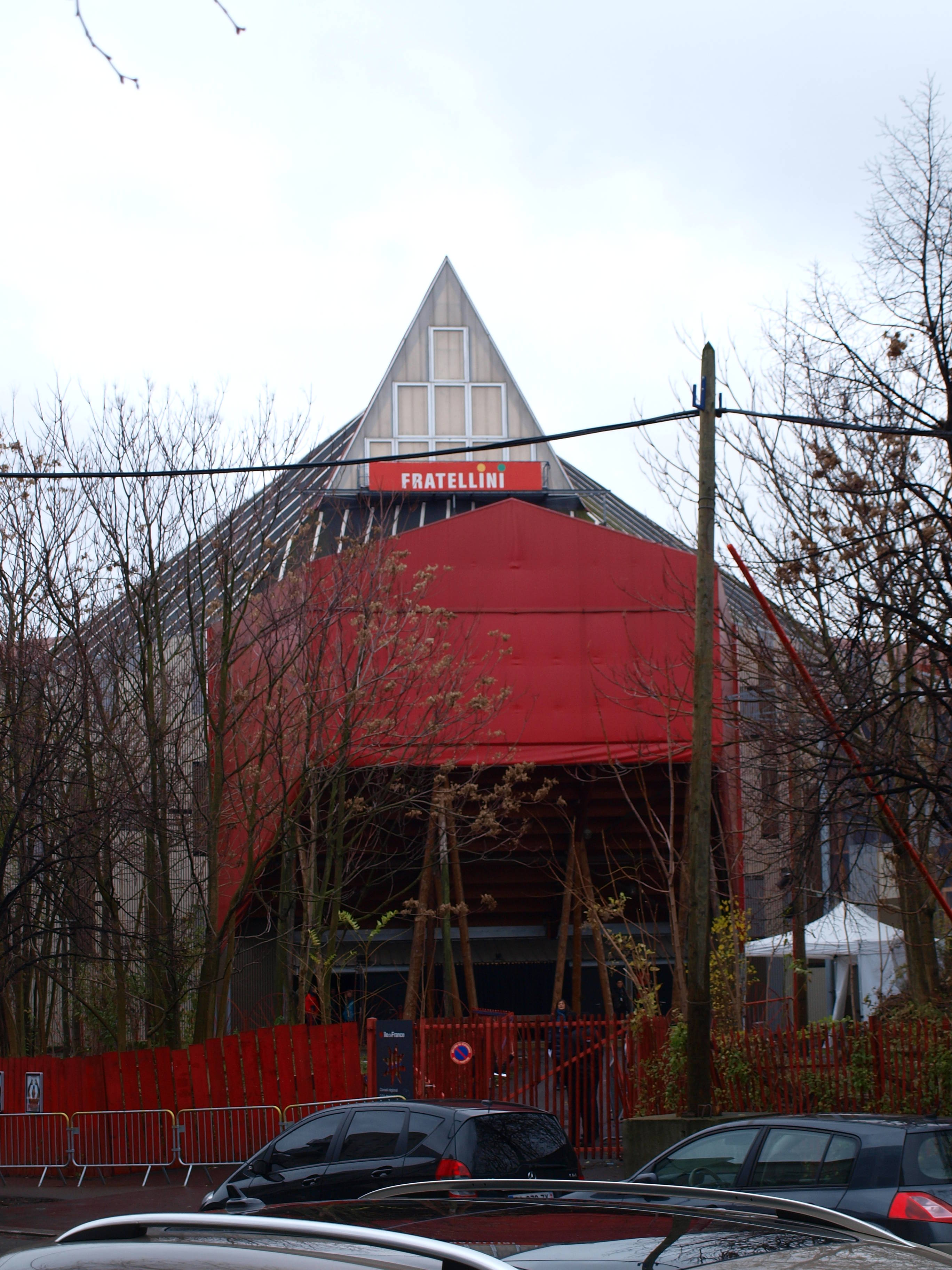 Centre international des arts du spectacle - Académie Fratellini à Saint-Denis (Seine-Saint-Denis, France)